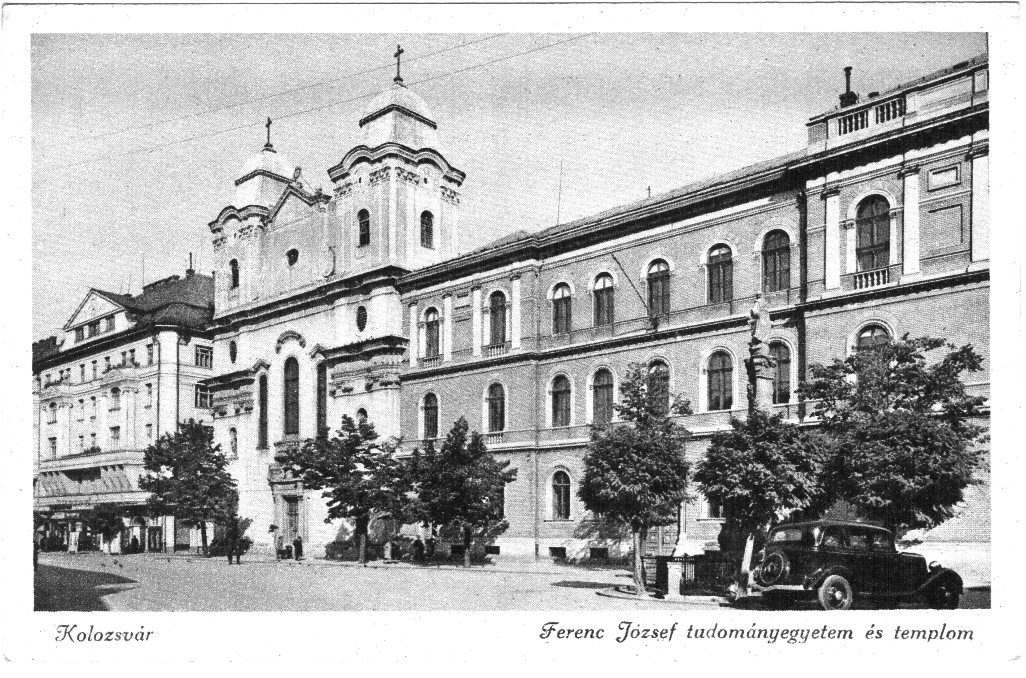 A képeslapot 2012. szeptember 23 -án szkenneltem A páratlan szám alatti képet követő páros szám alatti kép a képeslap hátsó oldala. PD-old. Published under Creative Commons in the Metapolisz DVD line. All of the photos and vids in the Metapolisz DVD line are under Creative Commons and can be used even for commercial – for profit – purposes. Recommended Citation Derzsi Elekes Andor: Metapolisz DVD line Megjelent Creative Commons alatt a Metapolisz sorozatban. A Metapolisz sorozat valamennyi képe és filmje Creative Commons alatti valamint kereskedelmi - for profit - célra is felhasználható. Ajánlott hivatkozás: Derzsi Elekes Andor: Metapolisz DVD line